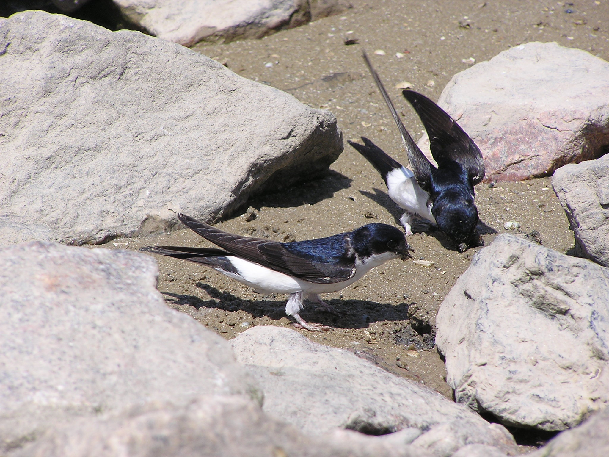 Городская ласточка, Delichon urbicum (Linnaeus, 1758), сфотографировано в Седово (Донецкая область)